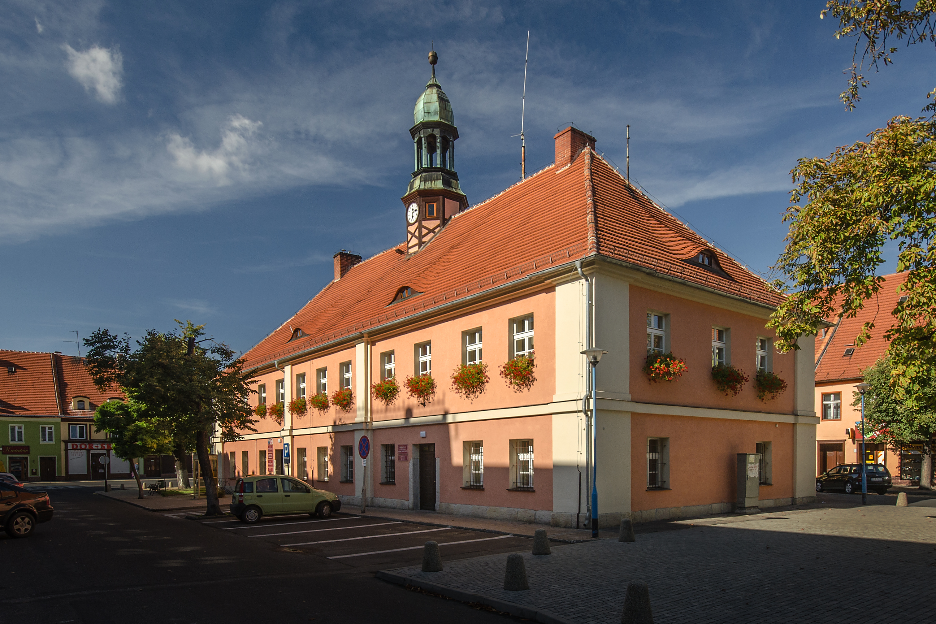 Prochowice, ratusz, kon. XVIII, XX